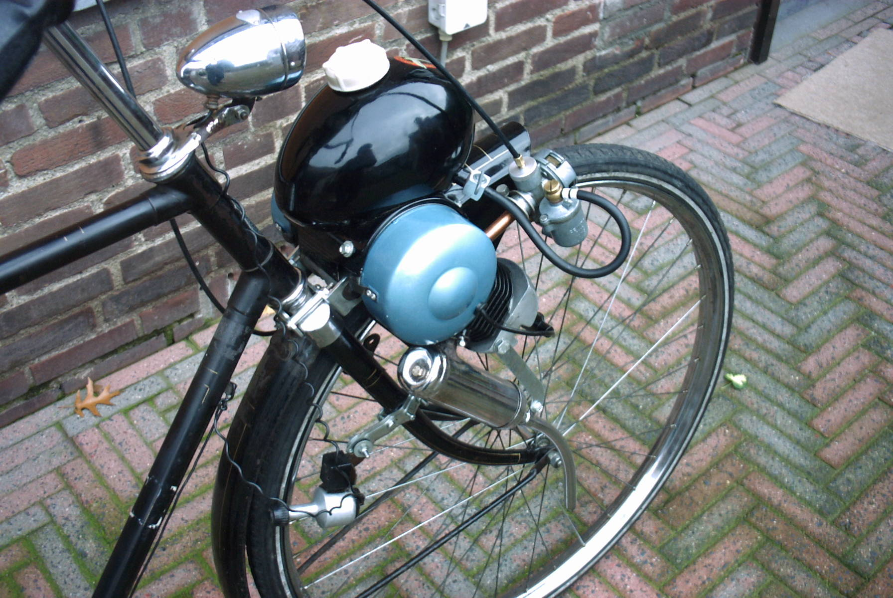 Berini M13 (eitje). Toestemming van Hans de Waal